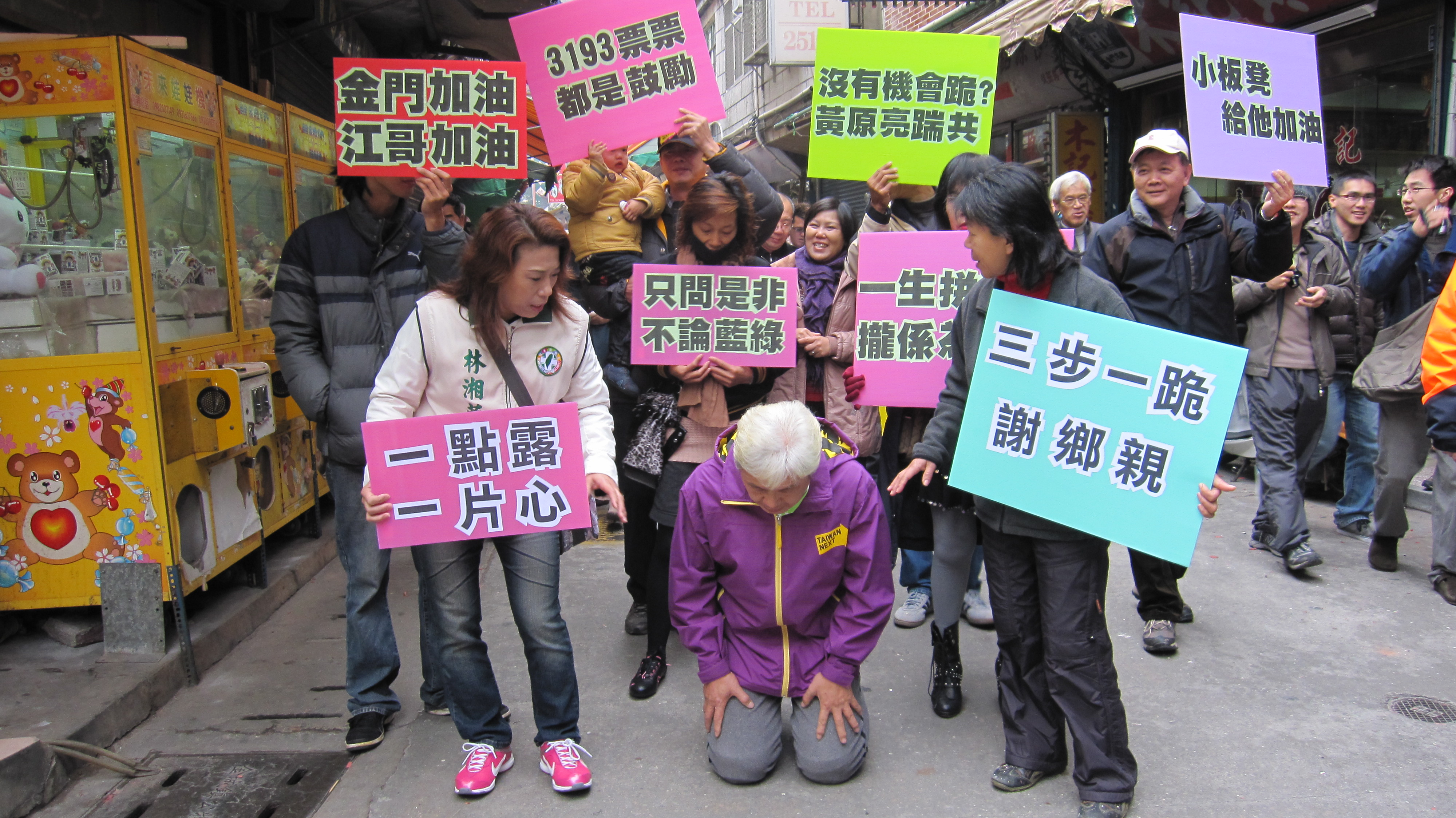 初五三步一跪